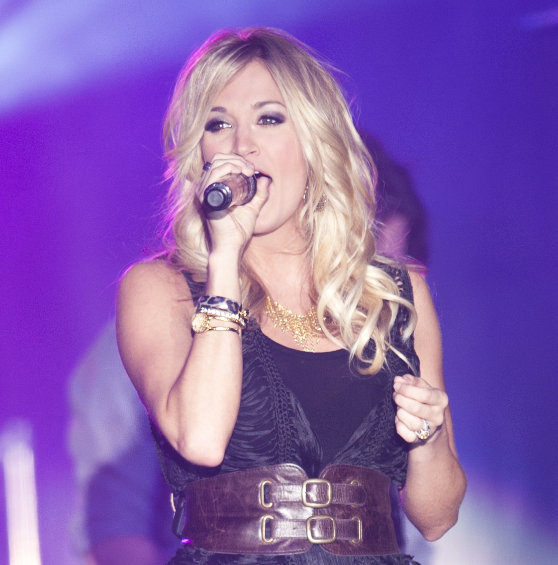 Carry Underwood_5